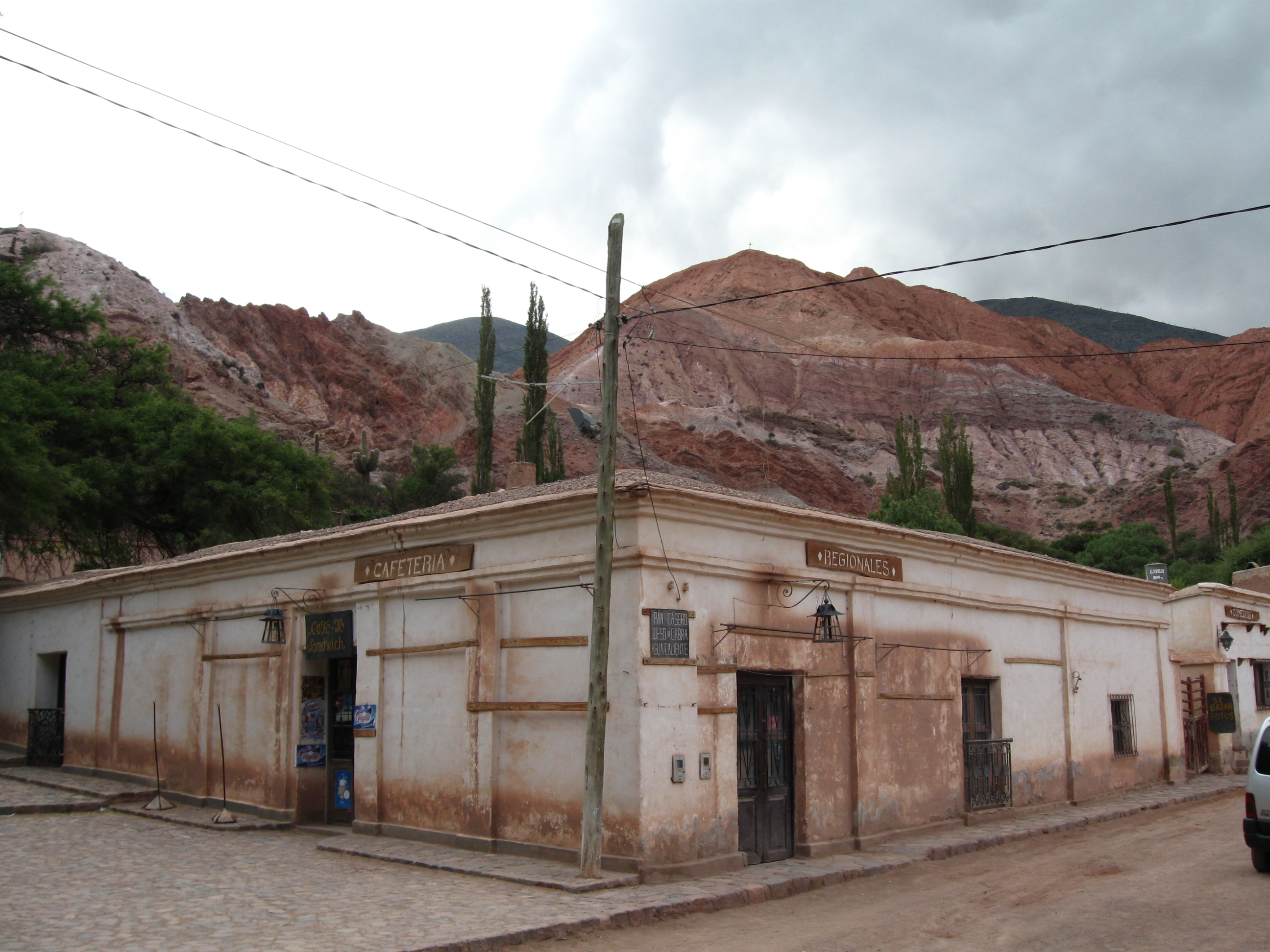 Calles de Purmamarca, provincia de Jujuy, Argentina.